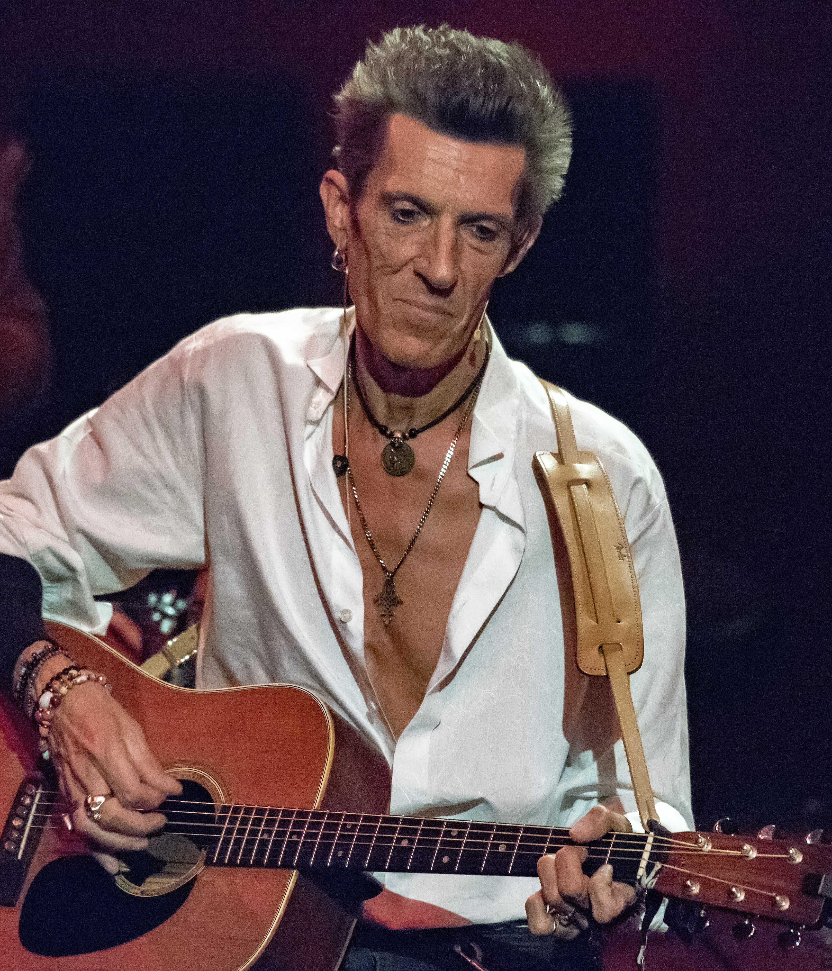 Willy Willy met de Scabs